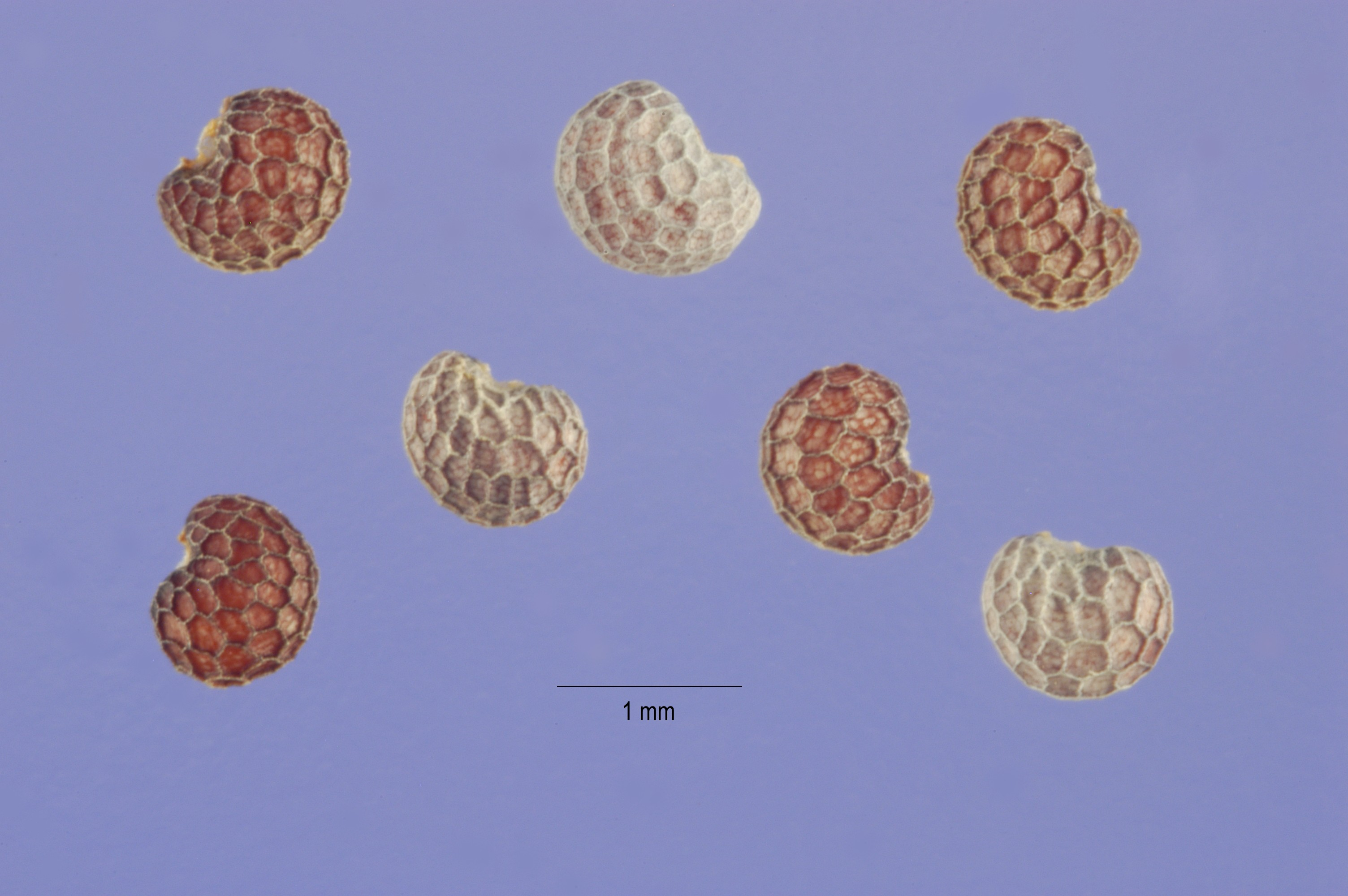 Papaver somniferum seeds